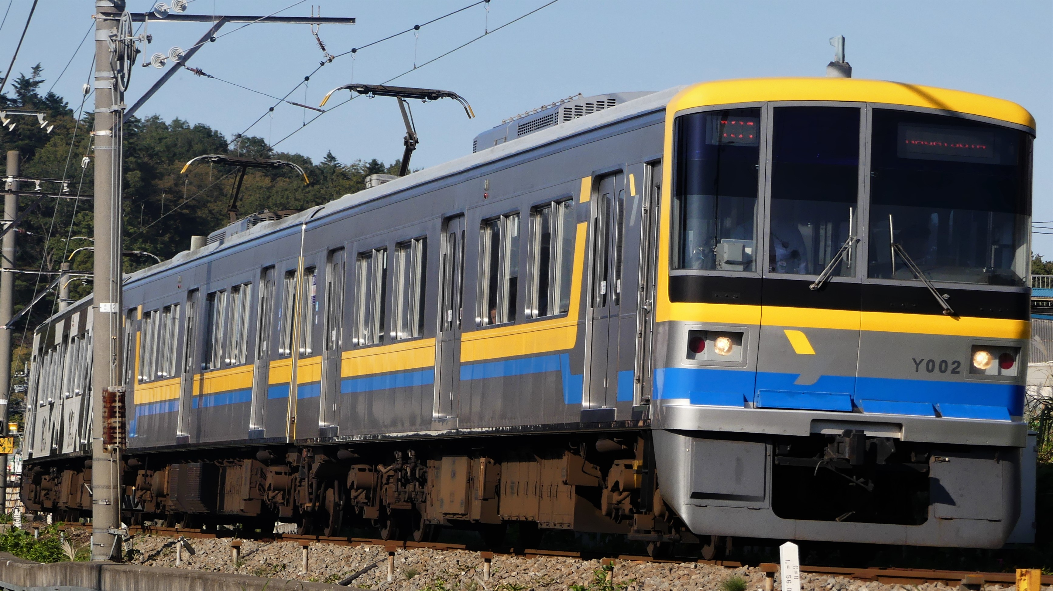 東急電車まつりin長津田開催に伴い、臨時で4両編成で運行されるこどもの国線